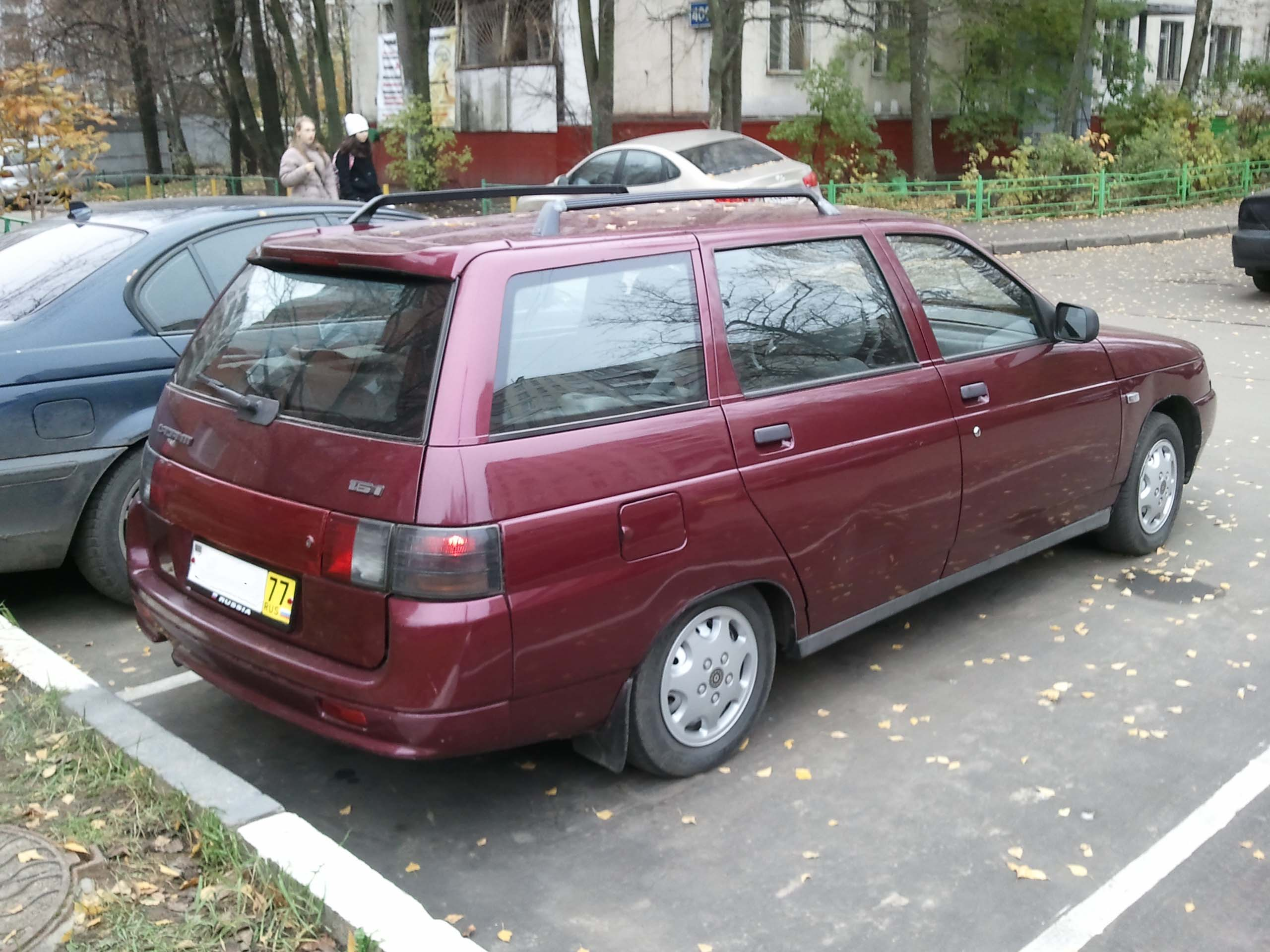 ВАЗ 21112 (2005), франкония